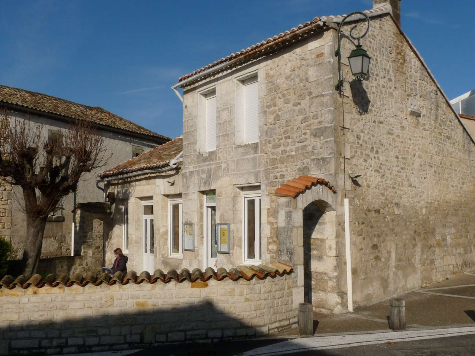 école, Garat, Charente, France